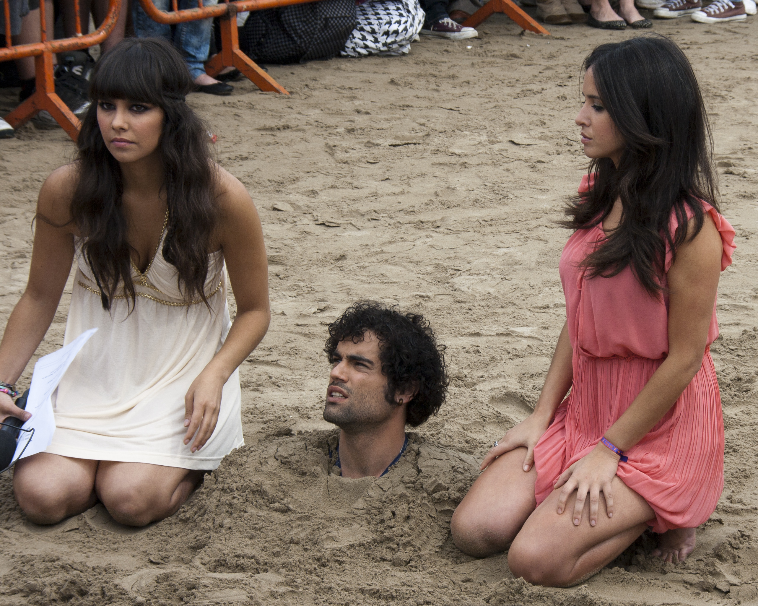 Paula Prendes, Cristina Pedroche y Jordi Mestre